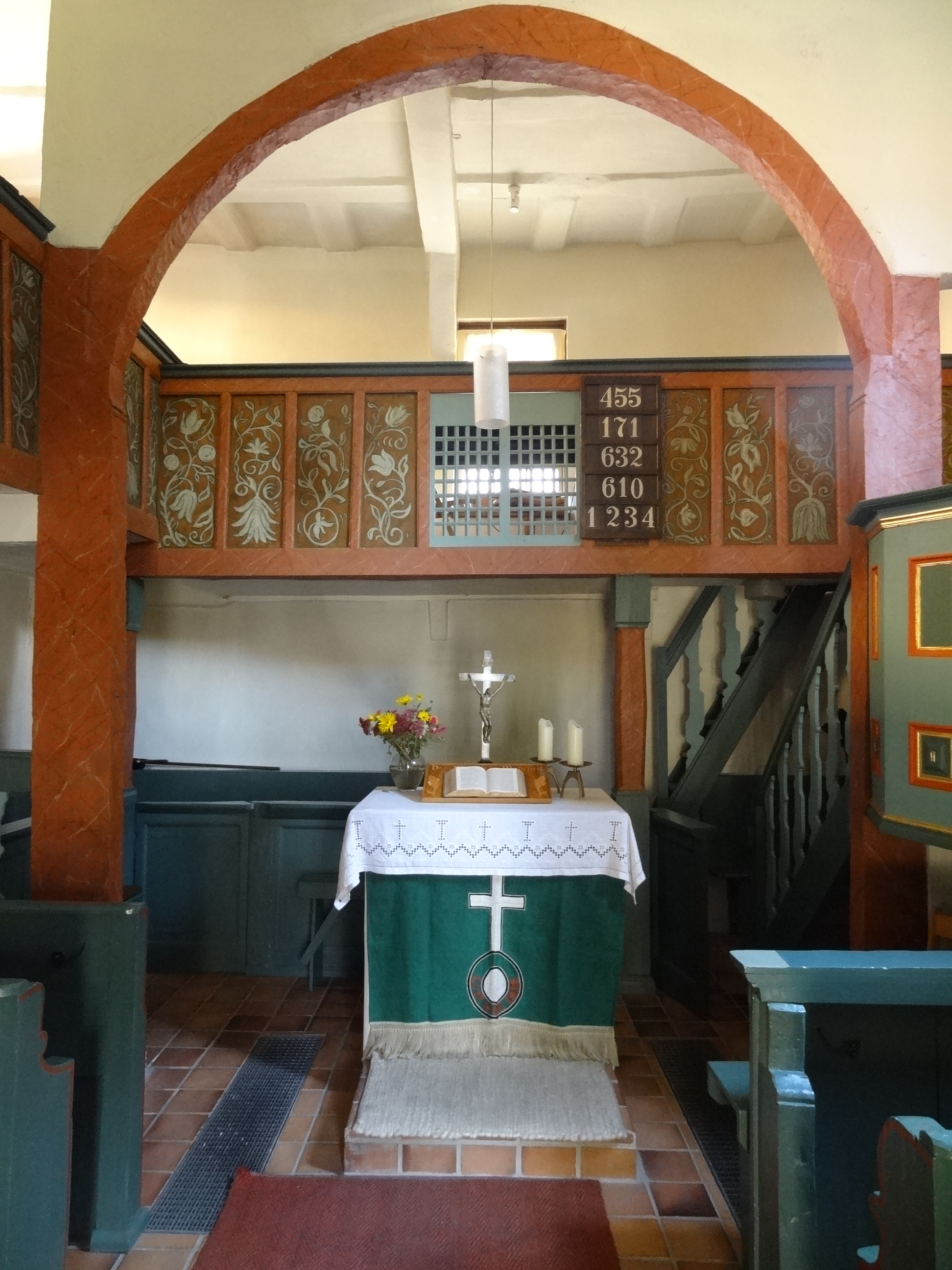 Evangelische Kirche Klein-Eichen